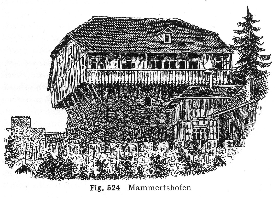 Mammertshofen